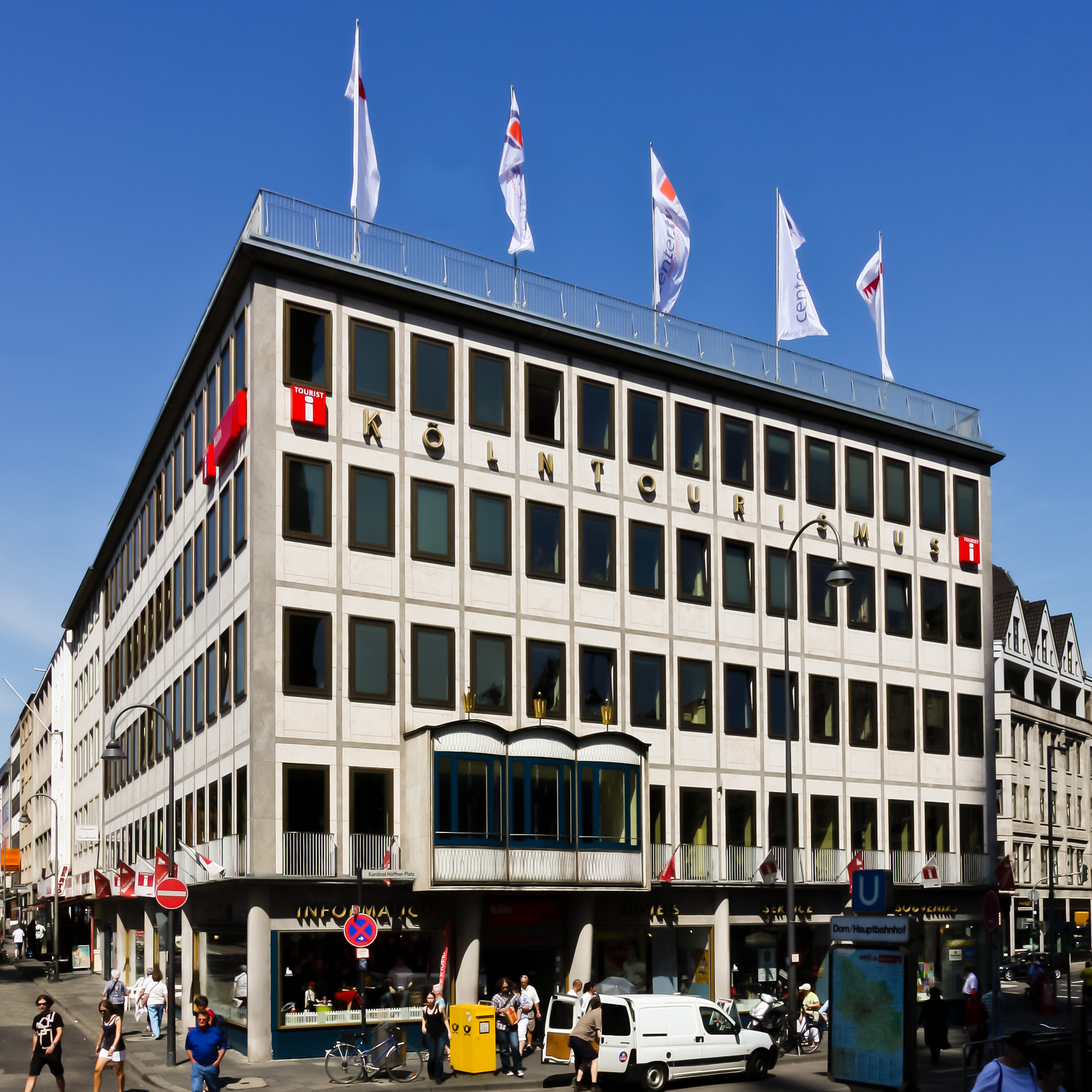 Denkmalgeschütztes Büro- und Geschäftshaus Burgmauer 2/Ecke Kardinal-Höffner-Platz 1 (ehemals Unter Fettenhennen 19), Köln. Architekt: Hans Joachim Lohmeyer. Im Erdgeschoss befindet sich die Touristeninformation / Kölntourismus